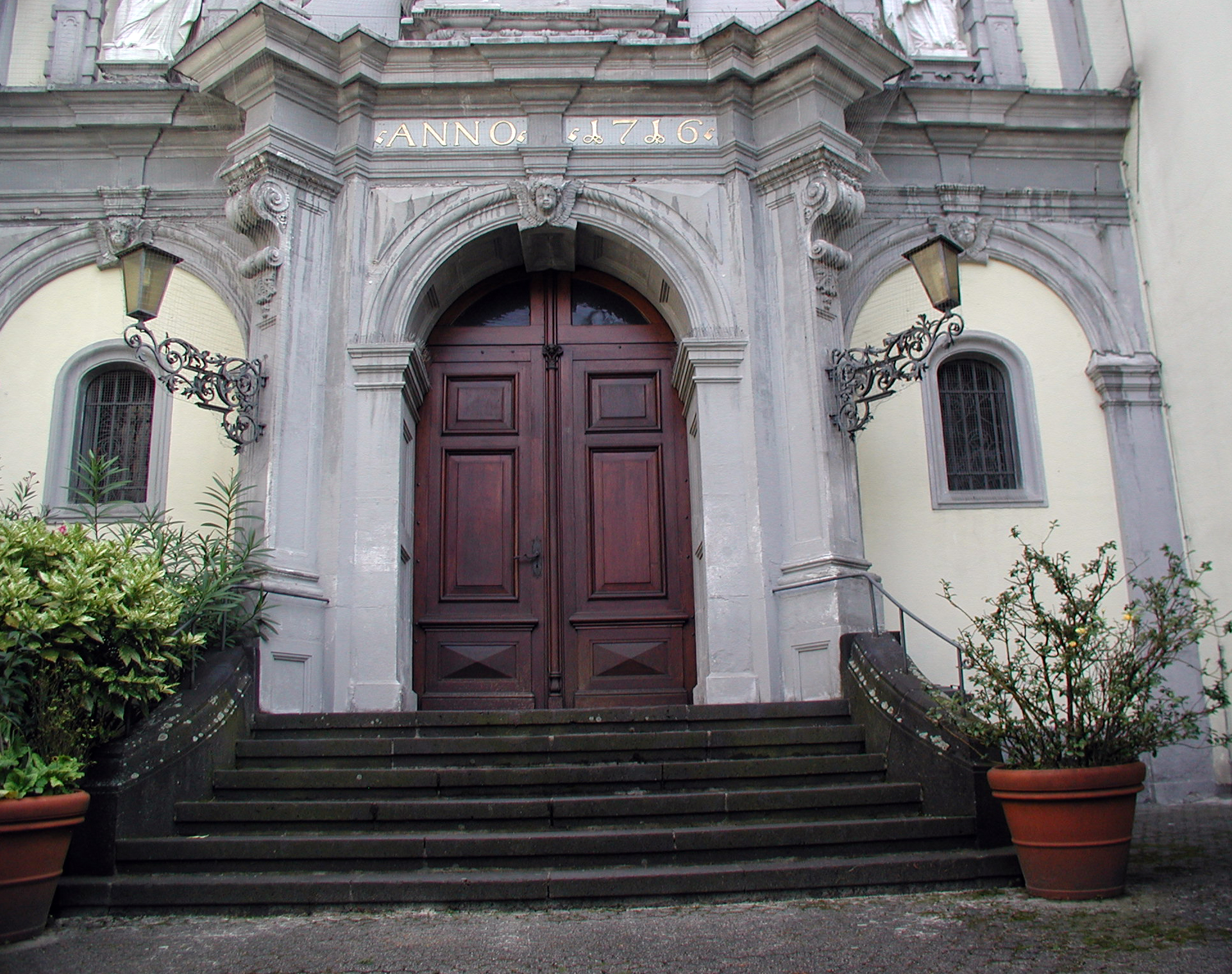 St. Maria vom Frieden, Köln